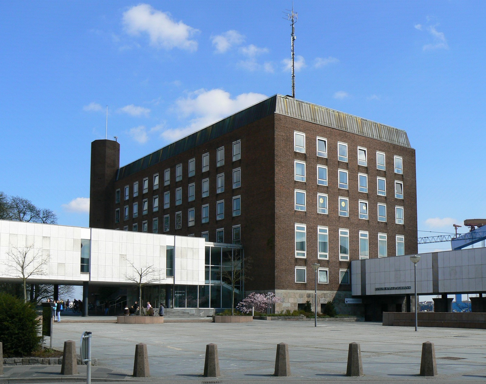 Kieler Schloss (Neubau). Blick von der Landseite (Westen).